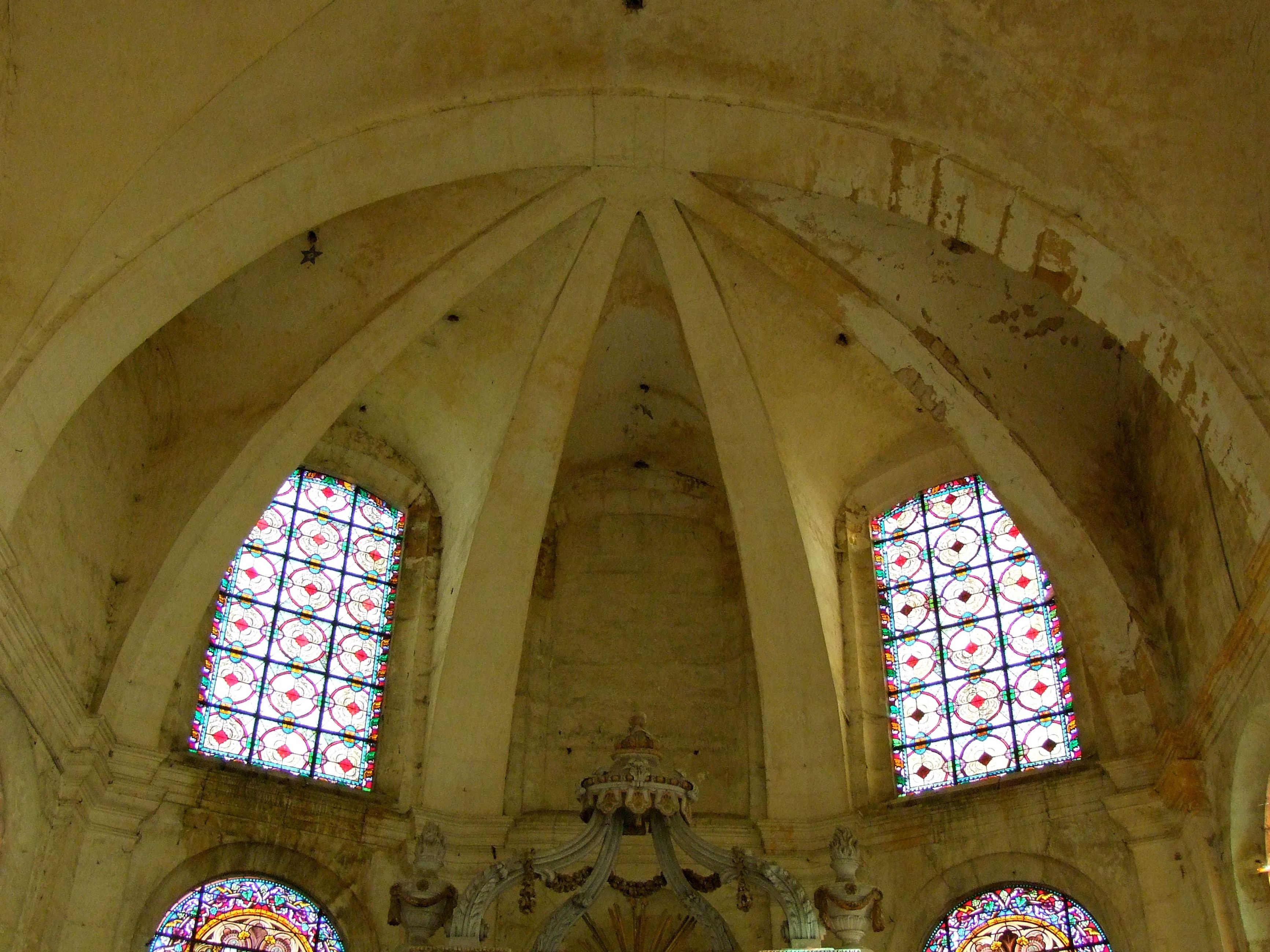 Couvrement du choeur de Saint-Martin, Montmédy, Meuse, France